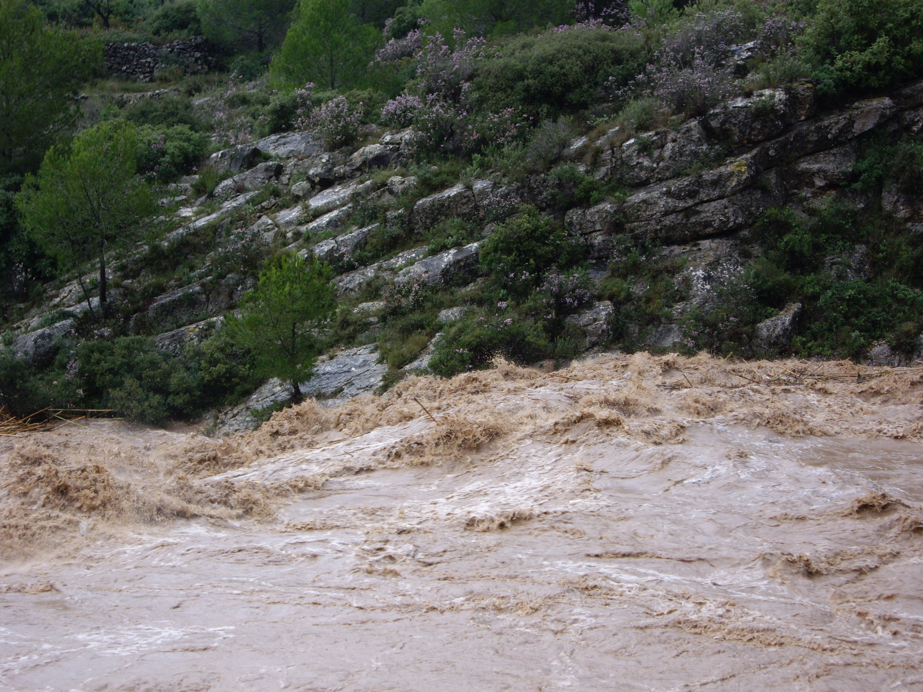 Riuà del Gorgos al seu pas per Gata, Marina Alta. Any 2007.